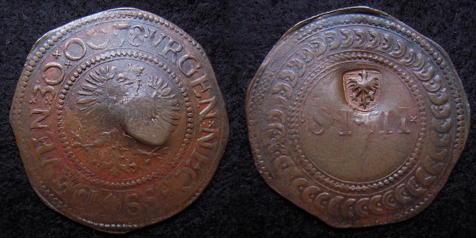 Koperen noodmunt van 4 stuivers, geslagen te Deventer op 30 oktober 1578, tijdens het beleg van Rennenberg. Met klop Deventer stadswapen.